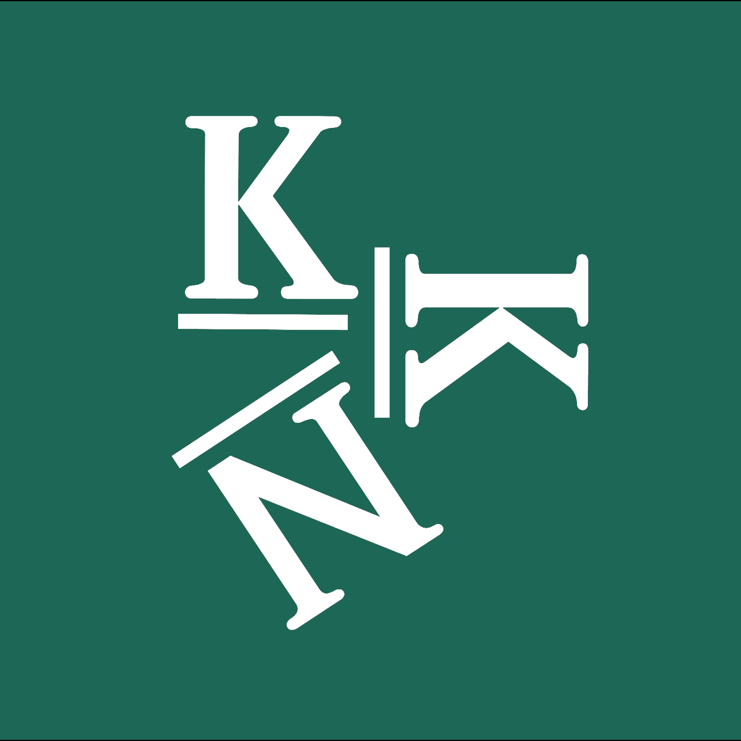 Logo Kunsthistorische Kring Nijmegen voorjaar 2020